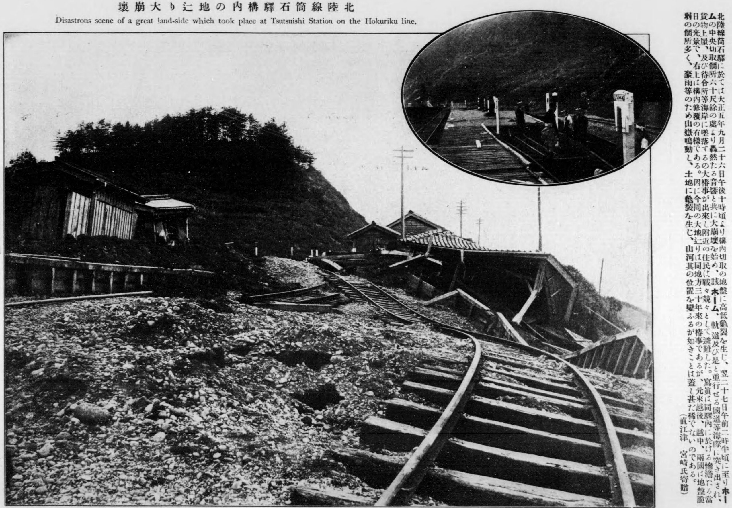 大正5年の筒石駅構内における地辷り